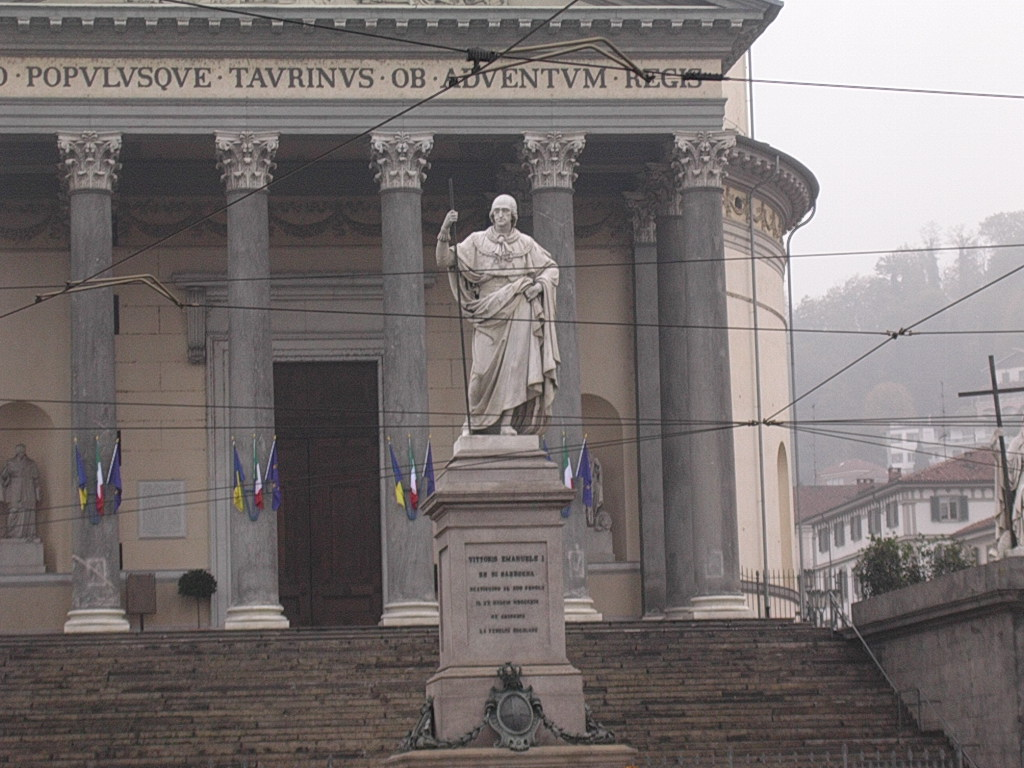 Statua di Vittorio Emanuele I di Savoia di fronte alla Chiesa della Gran Madre di Dio (Torino) Foto scattata dall'utente